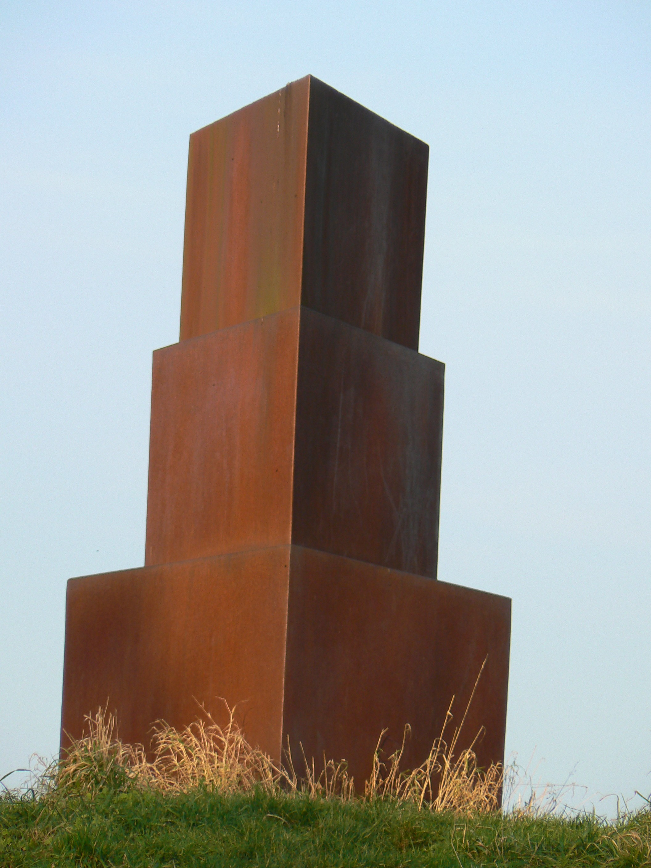 Sculpture Poort by René de Boer in Wagenborgen (Delfzijl)/The Netherlands